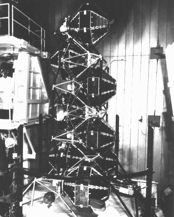 eight IDSCSP (DSCS I) satellites